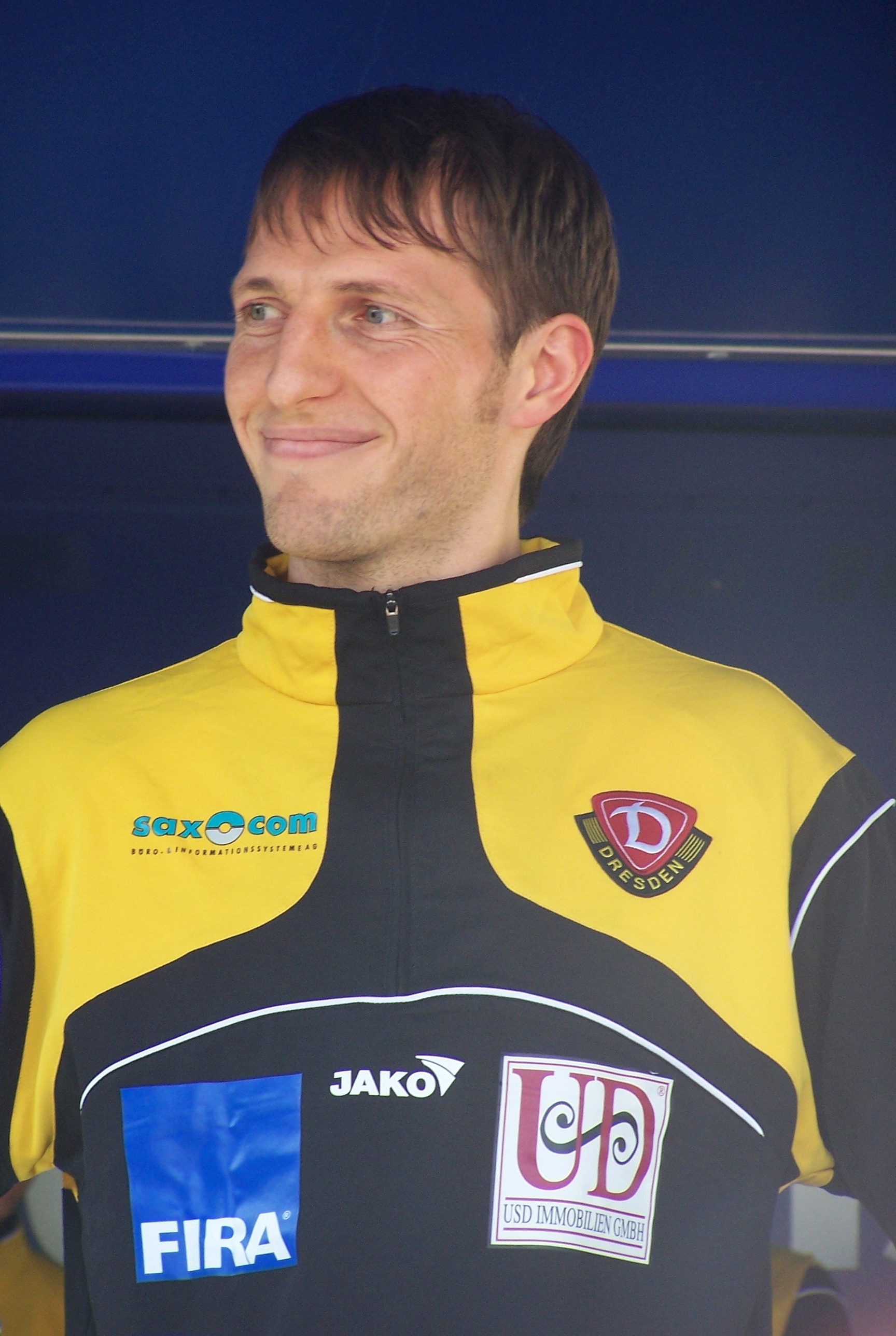 Volker Oppitz bei der Teampräsentation von Dynamo Dresden zum Start der Drittliga-Saison 2008/09